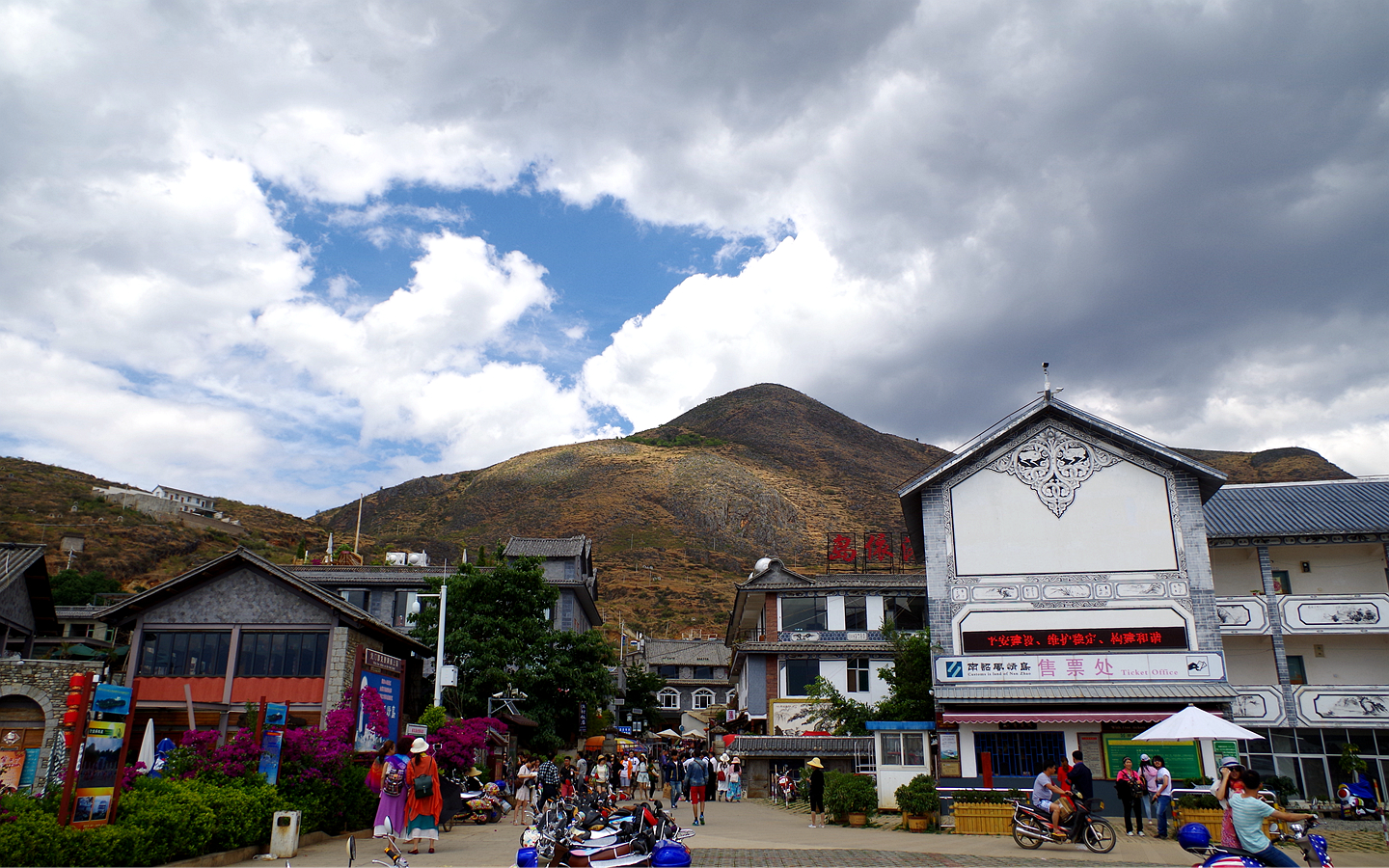 双廊古镇 Shuanglang Town